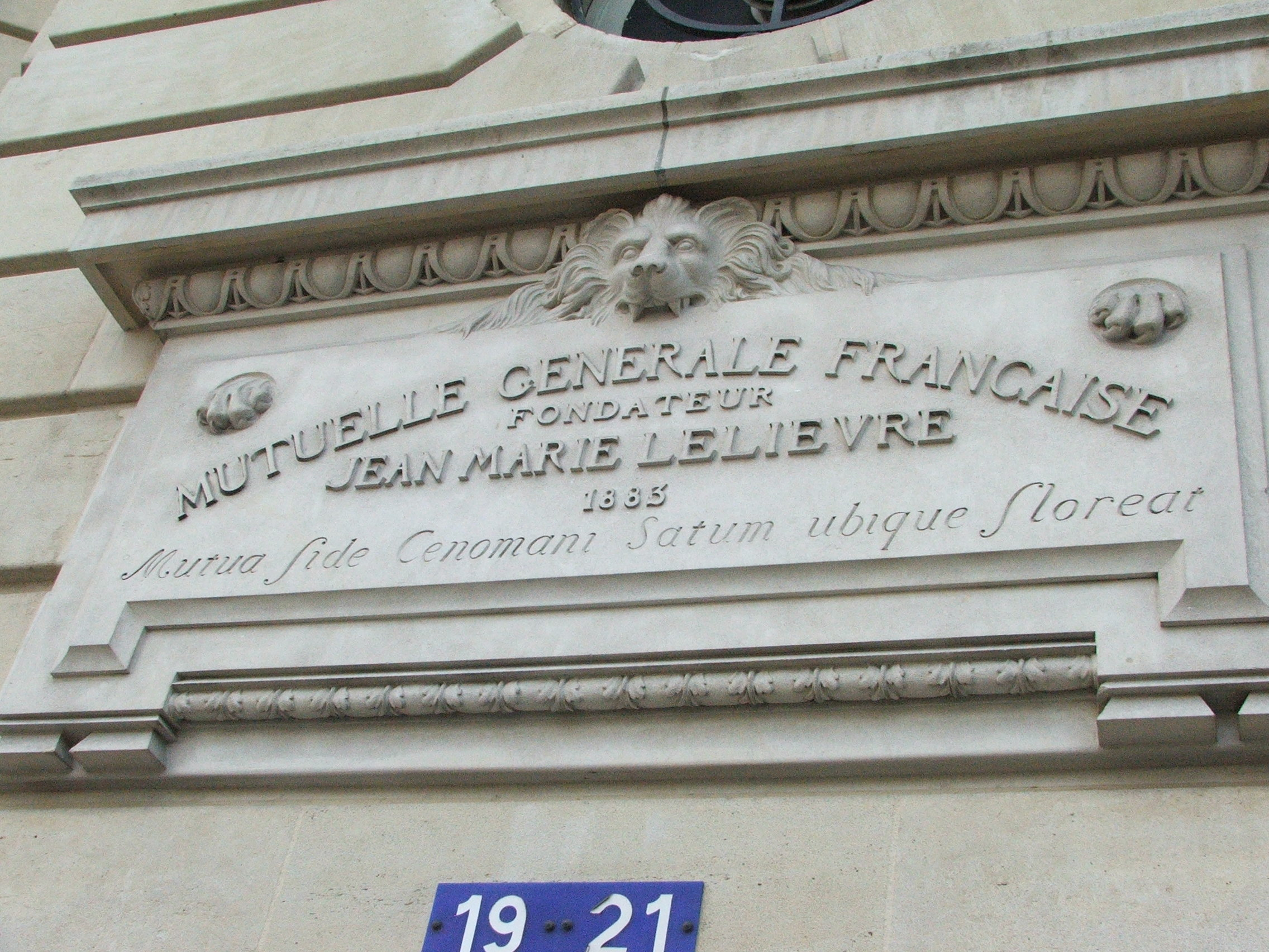 Gravure originale de la Mutuelle Générale Française, aujourd'hui MMA, rue Chanzy au Mans sur l'ancien hôtel particulier des MMA.